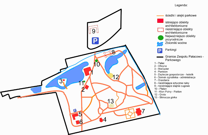 aut. Szymon Balcer